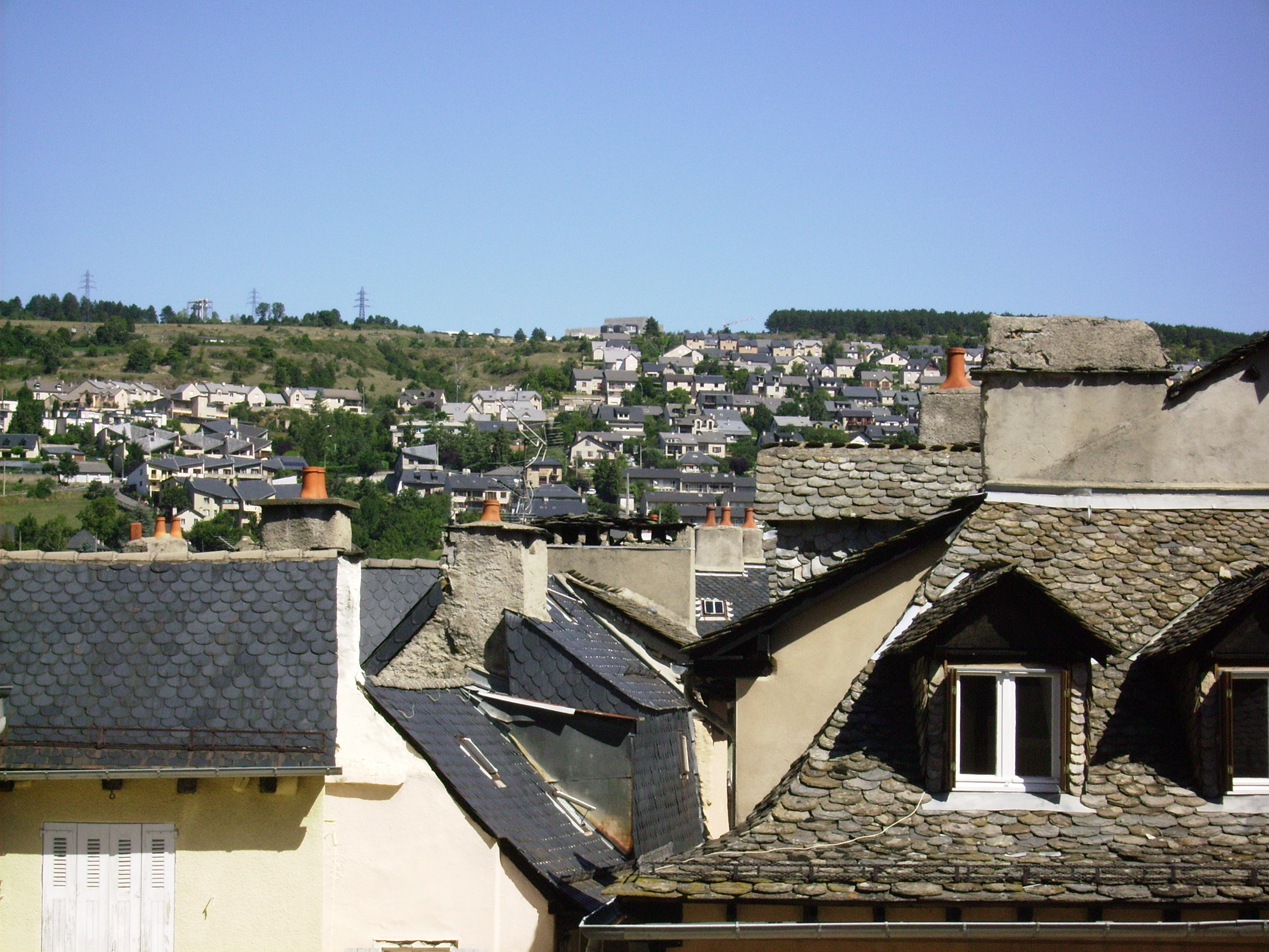 Vue de Mende (Lozère, France)